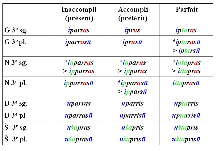 Paradigme du verbe akkadien parāsum, aux thèmes G, N, D, Š, à l'inaccompli, à l'accompli et au parfait. Les marques de personnes sont en bleu, les infixes en vert et les voyelles thématiques (ici, a à l'inaccompli, u à l'accompli) en rouge.